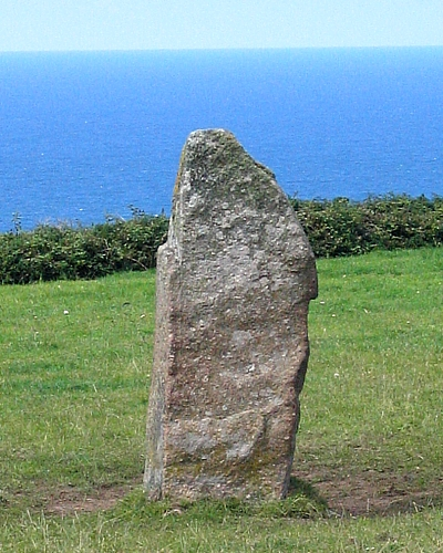 Menhir - Zennor - Cornwall - UK